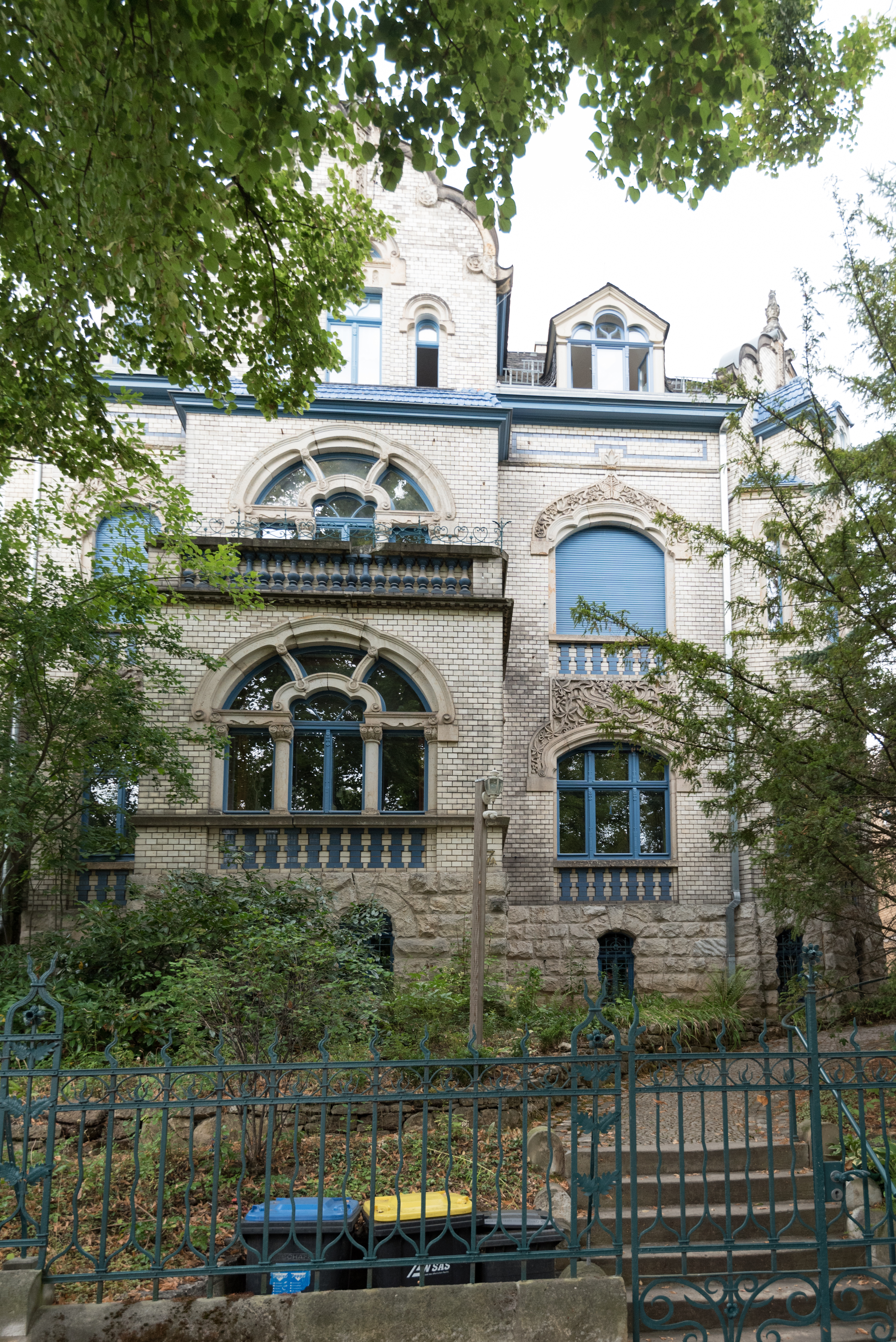 Naumburg (Saale), Luisenstraße 17a